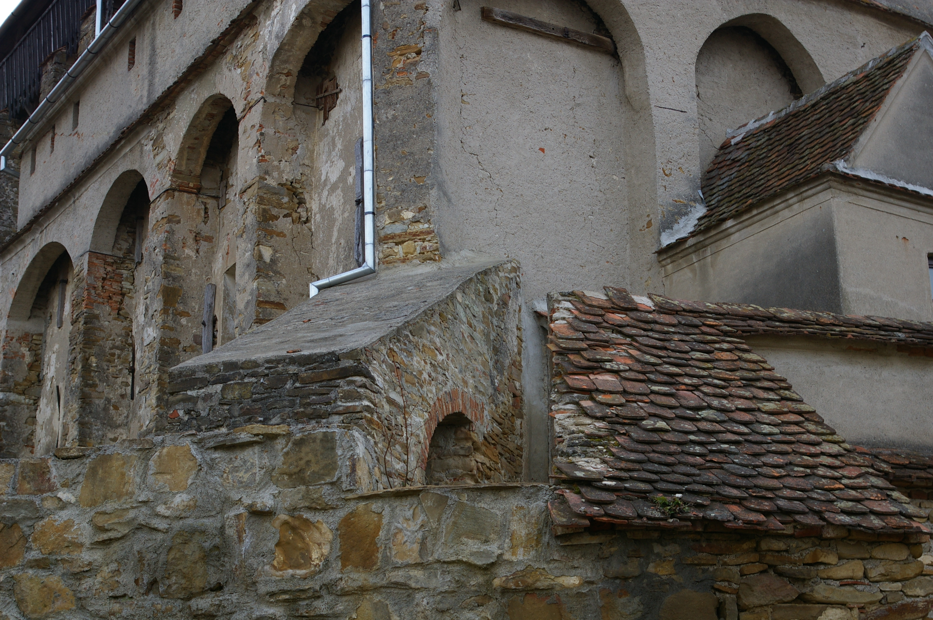 Wehrgeschoss der Wehrkirche in Seligstadt